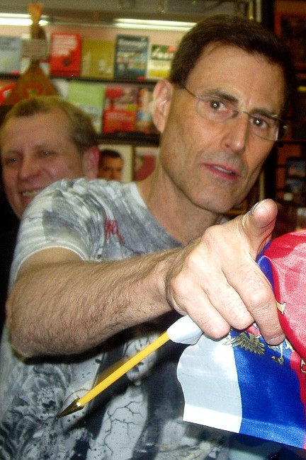 Uri Geller in Moscow (Russia)